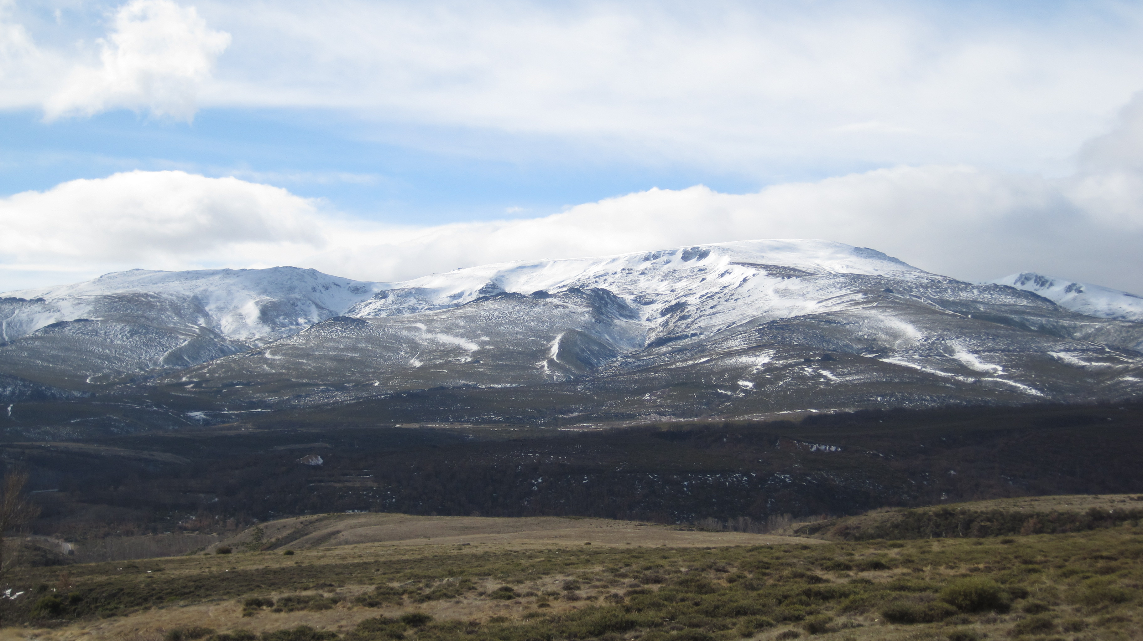 Vista del monte Teleno (León, España) en época invernal.